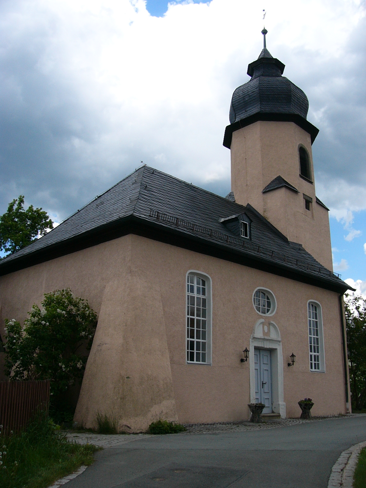 Ansicht der Pfarrkirche Isaar